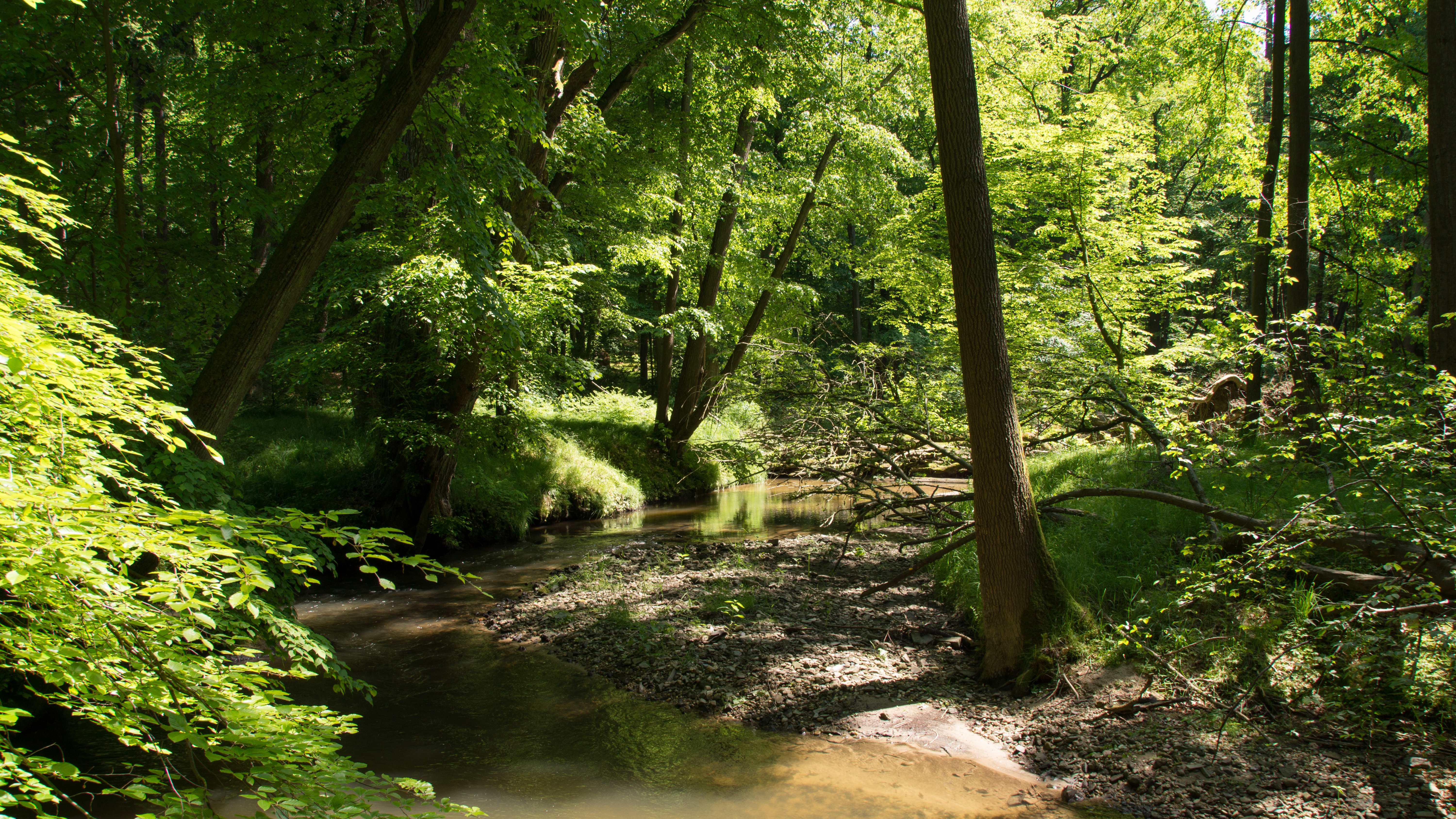 Tiefental Königsbrück